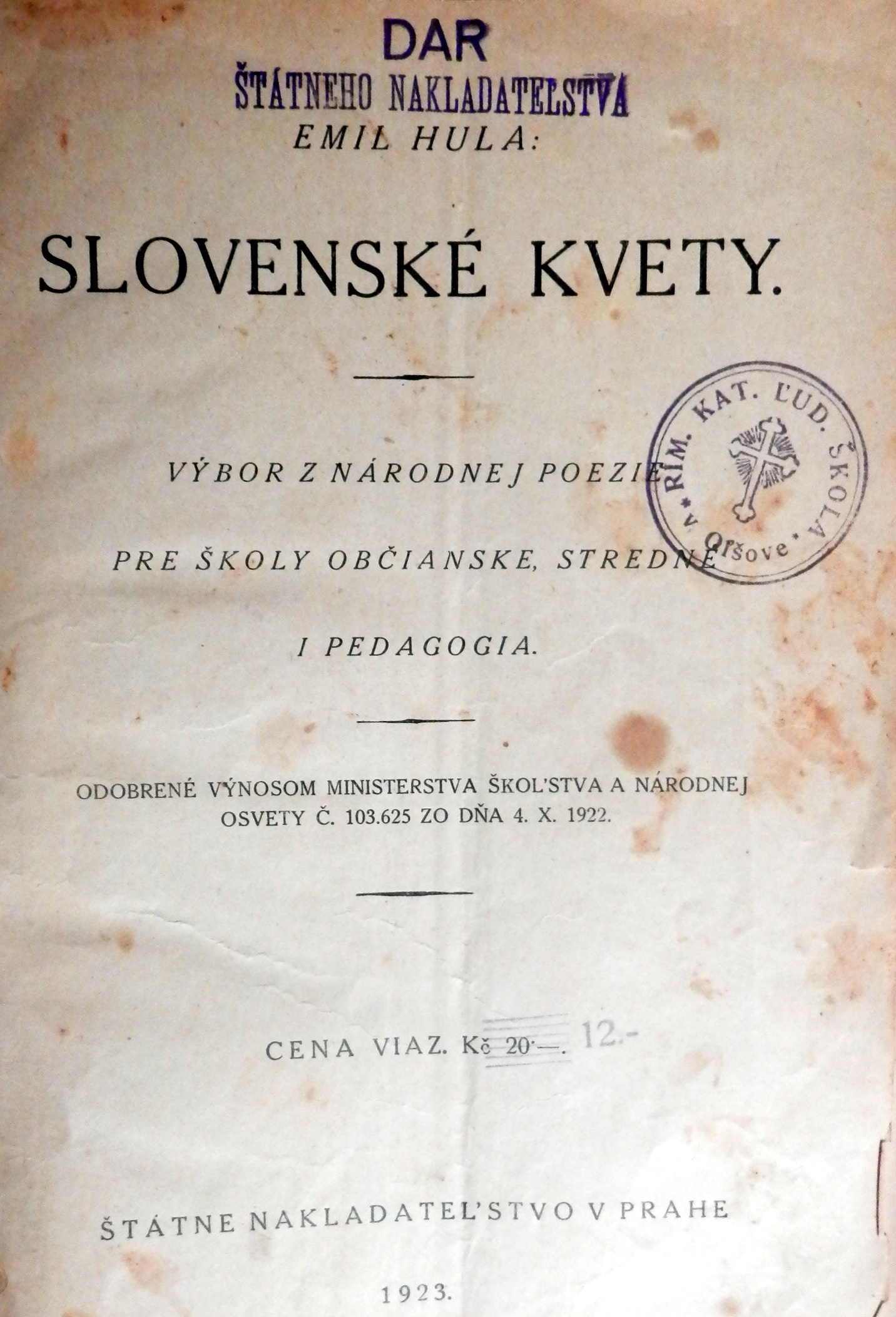 Okrúhla pečiatka na predsádzke knihy, potvrdzuje, že v dobe vydania knihy v roku 1923, v obci Oľšov, okres Sabinov, už existovala samostatná Rímskokatolícka ľudová škola.